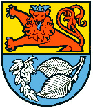 Wappen von Utzenhain